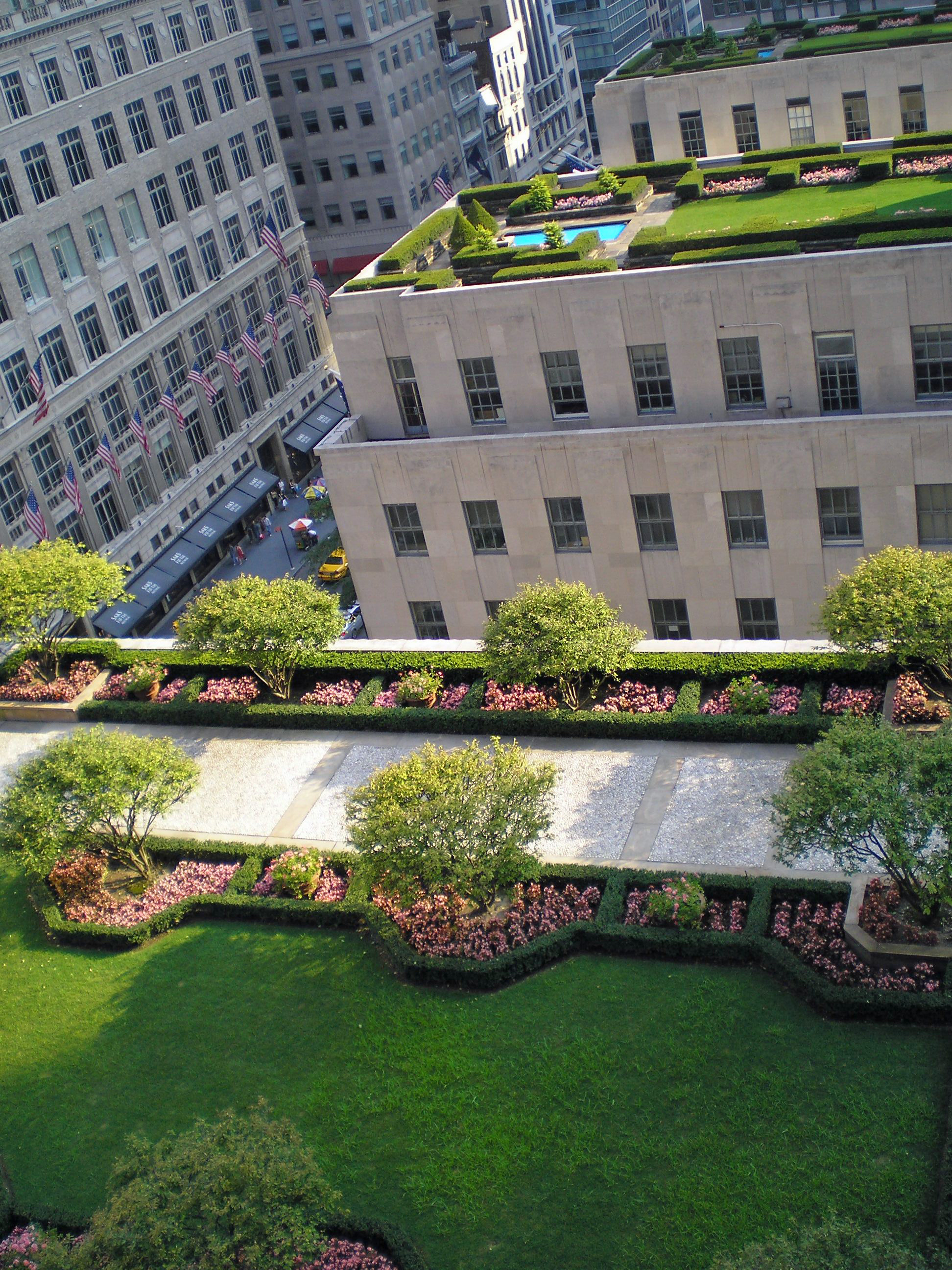 Rockefeller Center rooftop 2 gardens